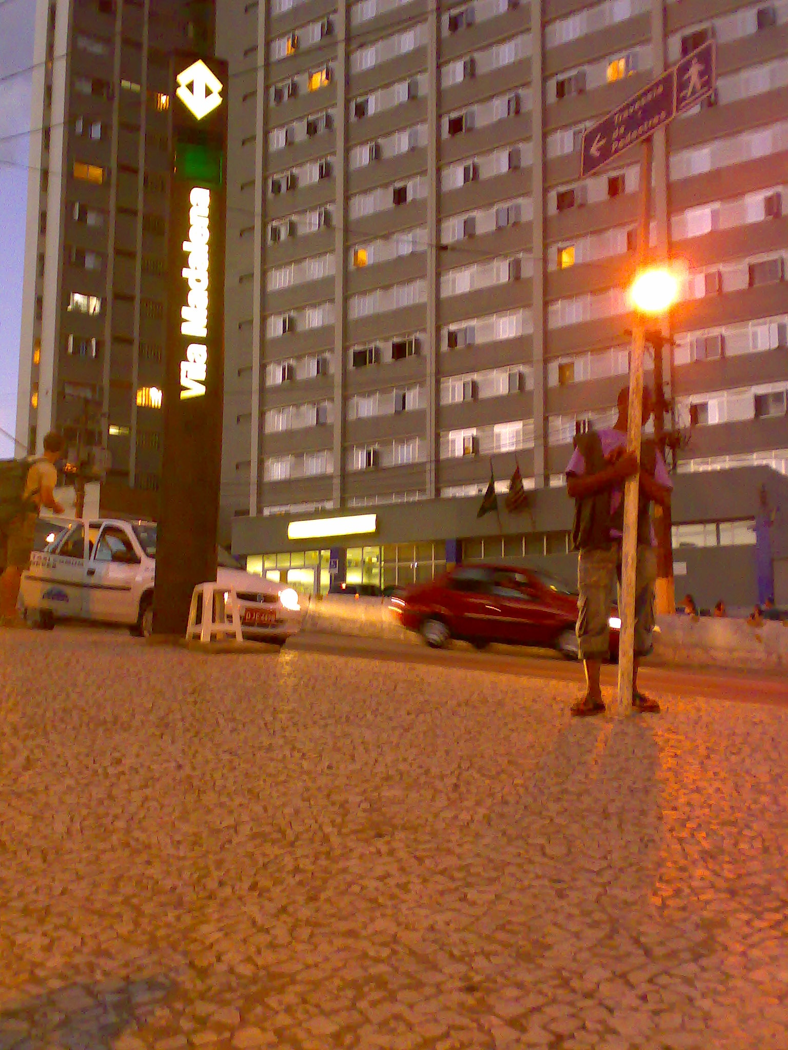 Portuguese pavement in Vila Madalena, São Paulo.